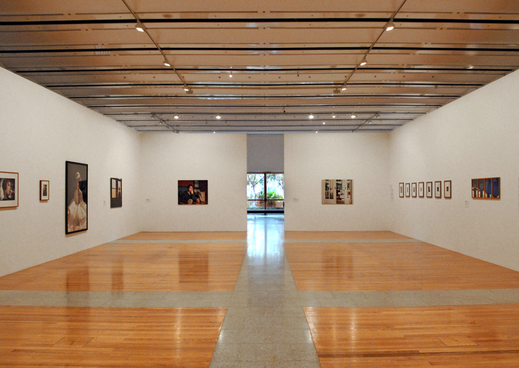 Salle "du féminin dans l'art" de présentation de photographies d'artistes : Ana Mendieta, Cindy Sherman, Helena Almeida Oeuvres présentées dans le musée Colecçao Berardo à Lisbonne